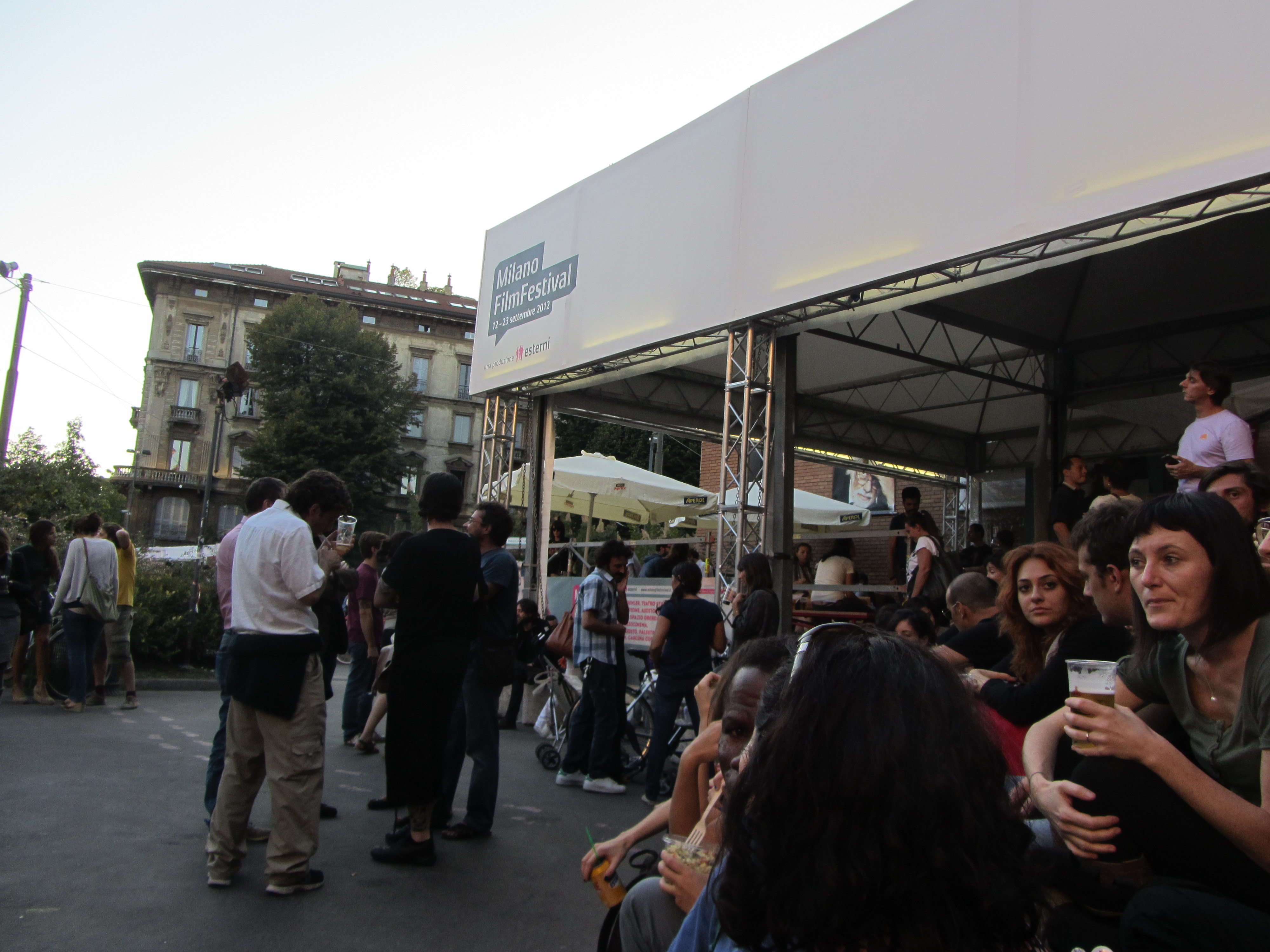 Milano Film Festival 2012